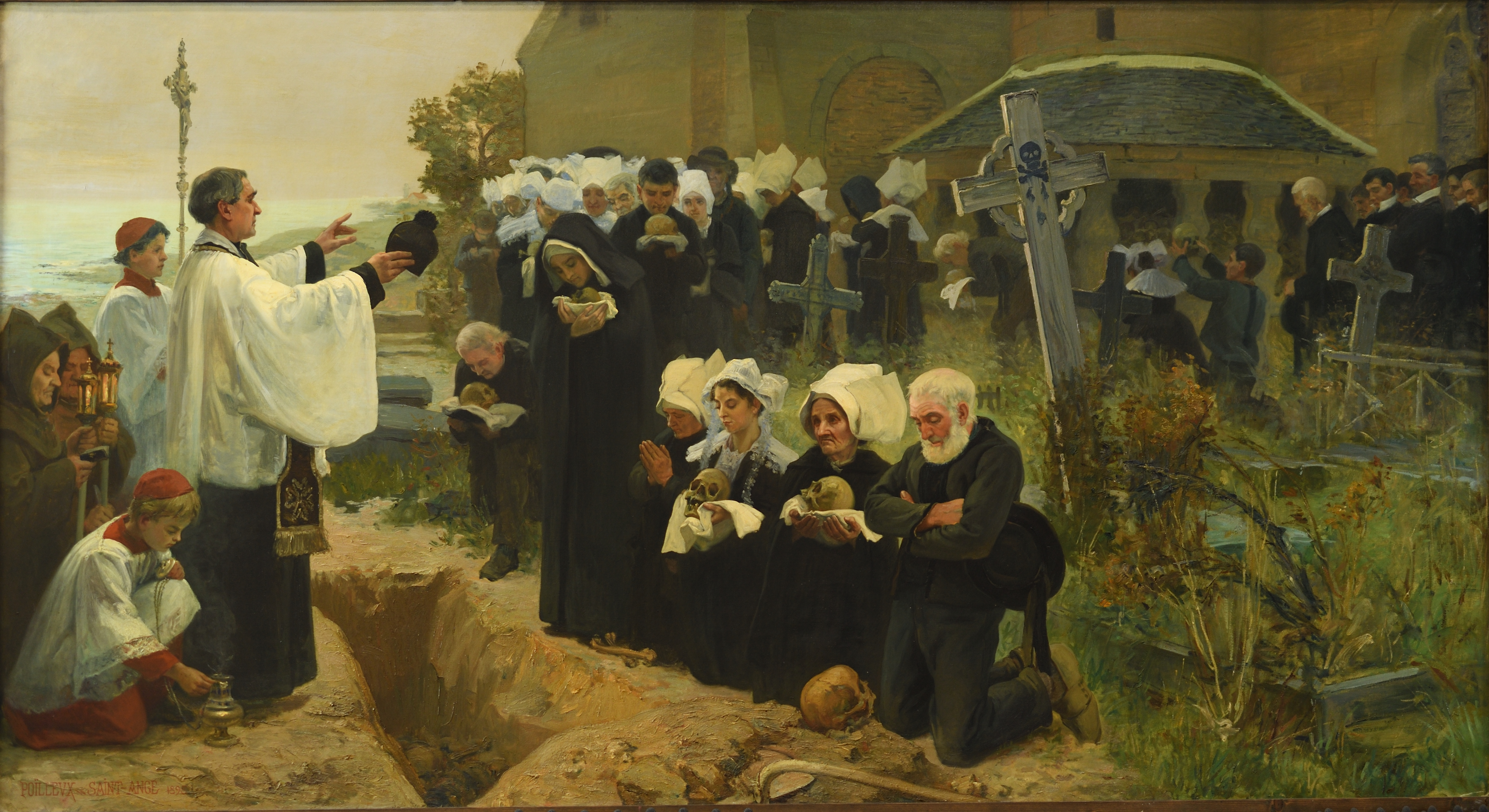 Reproduction du tableau, Trégastel